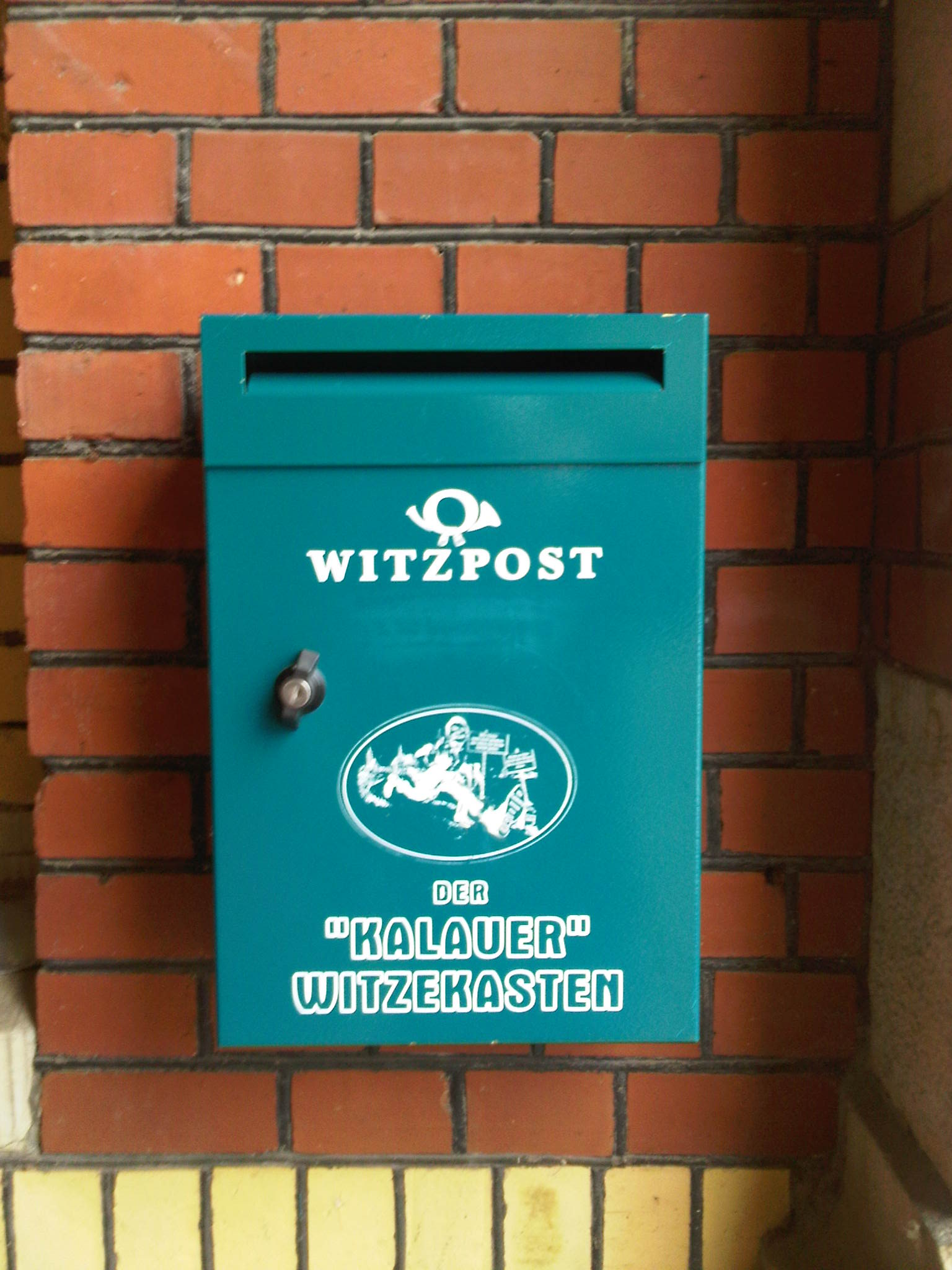 Kalauerbriefkasten am Rathaus Calau, Stadt im Landkreis Oberspree-Lausitz, Brandenburg